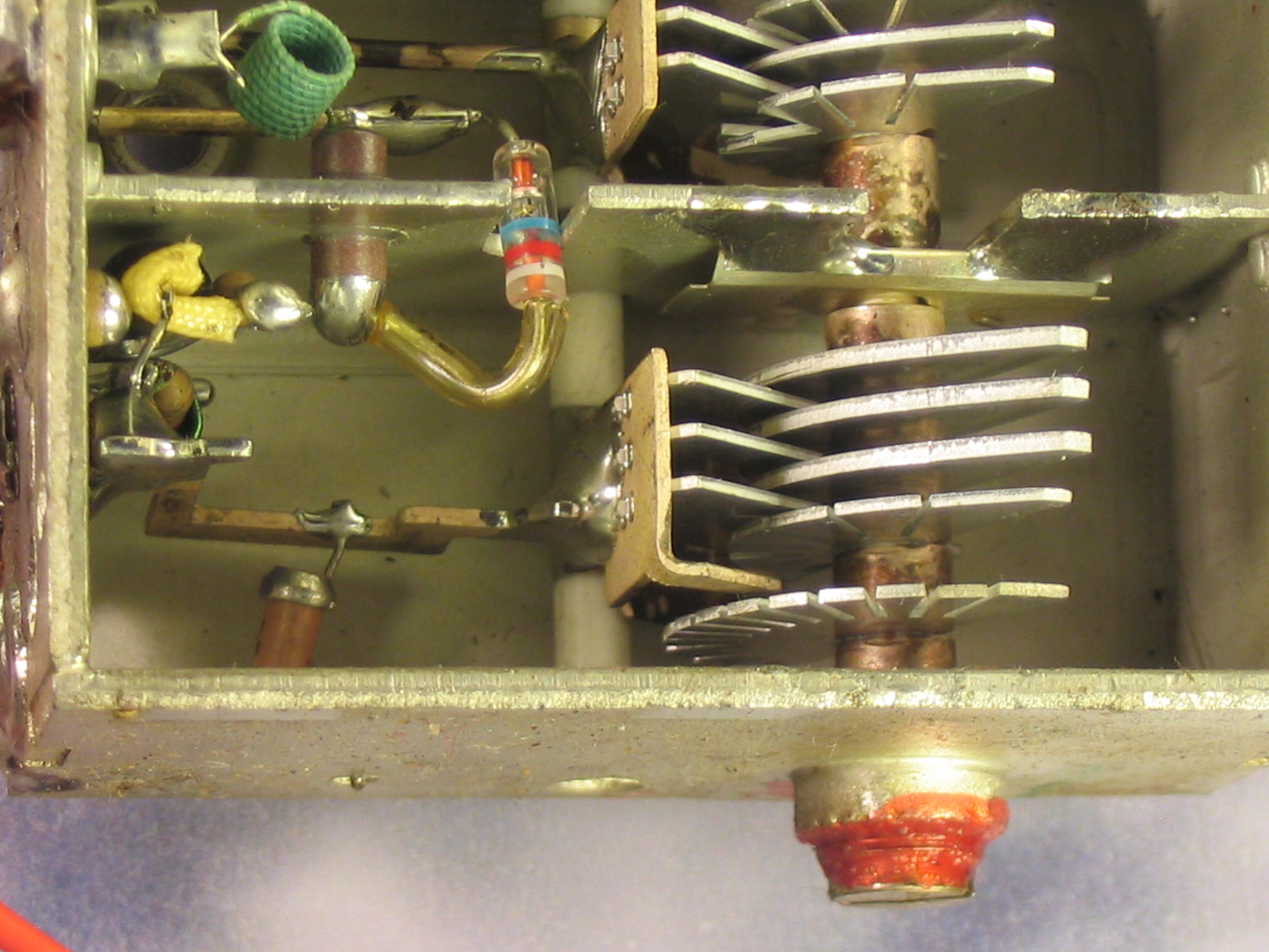 vzduchový otočný kapacitní trimr.